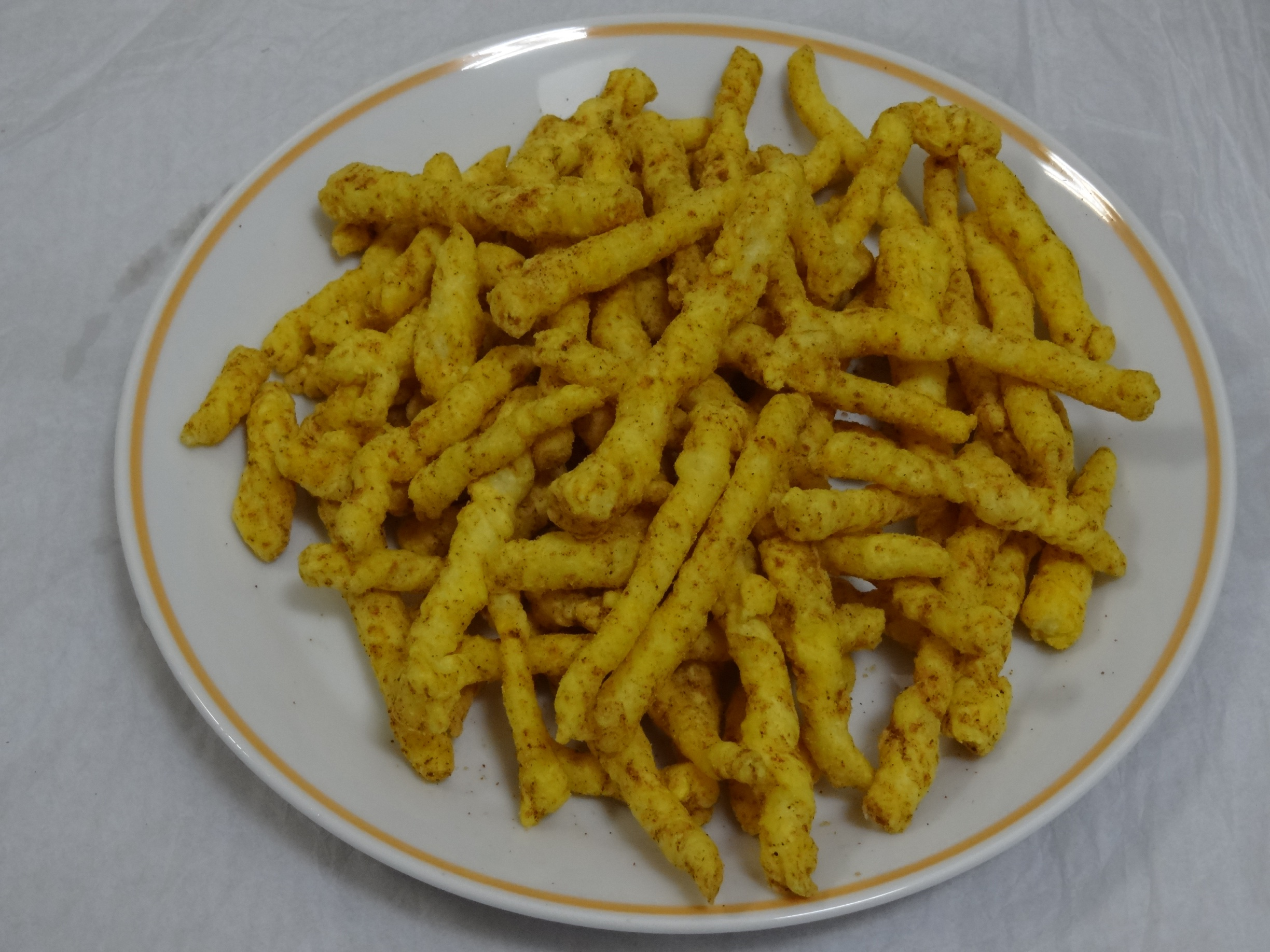 スコーン（和風バーべキュー）